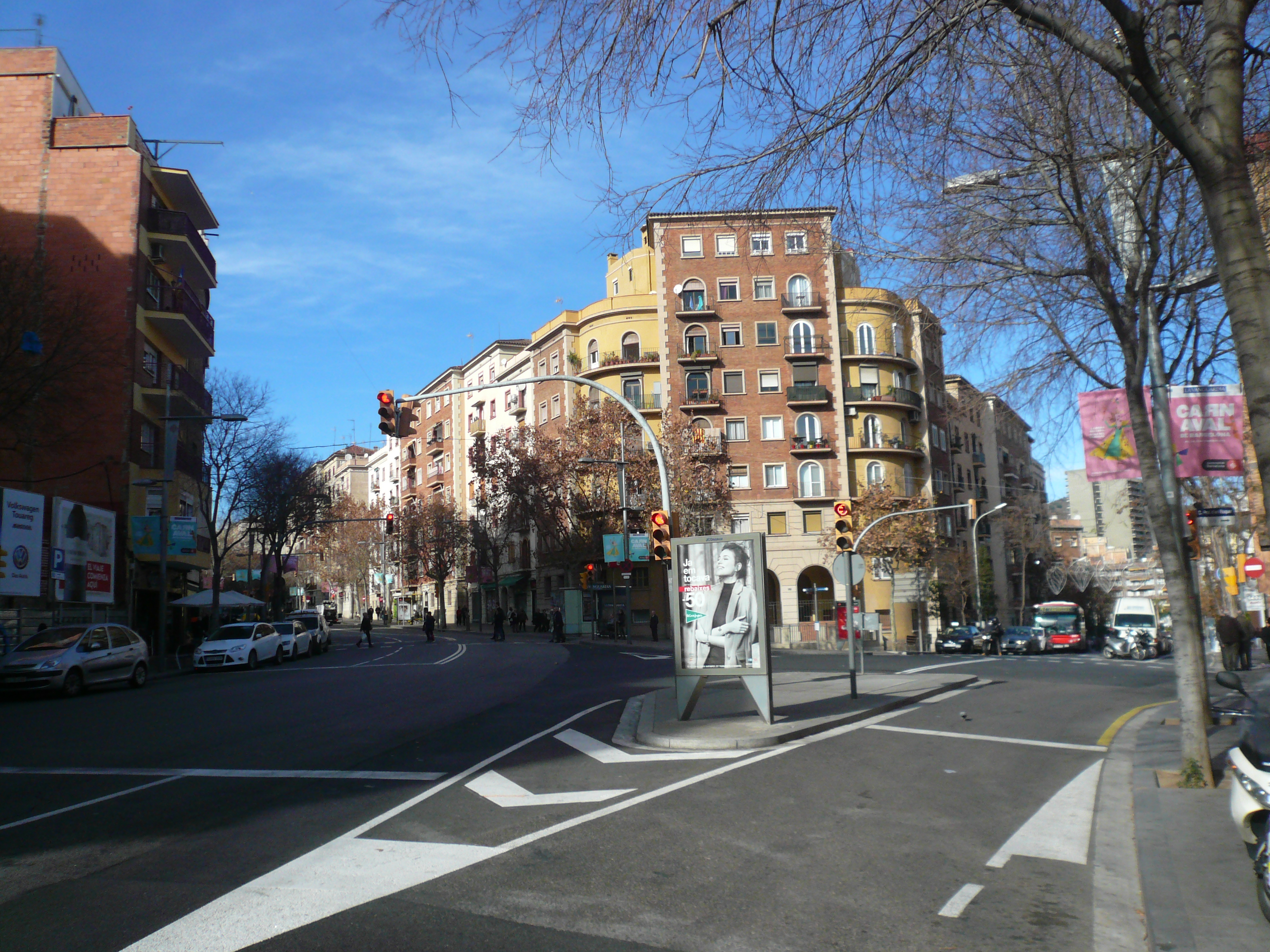 Els Quinze.